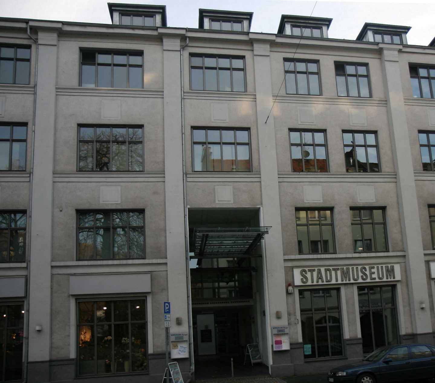 Stadtmuseum (1. Etage) im Historischen Centrum Hagen, Eilper Straße 71 in Hagen-Eilpe.